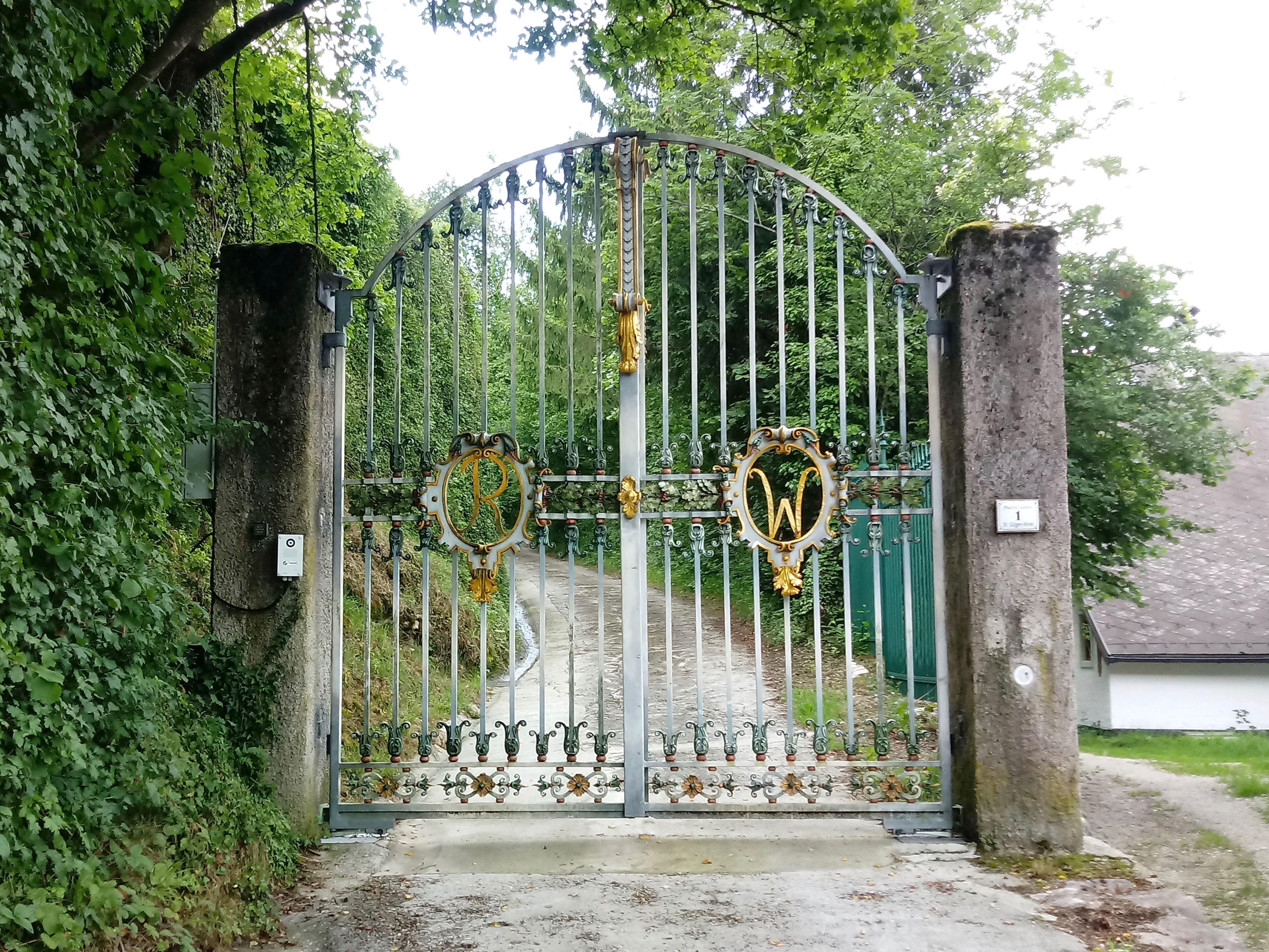 Schlossanlage Hüttenstein